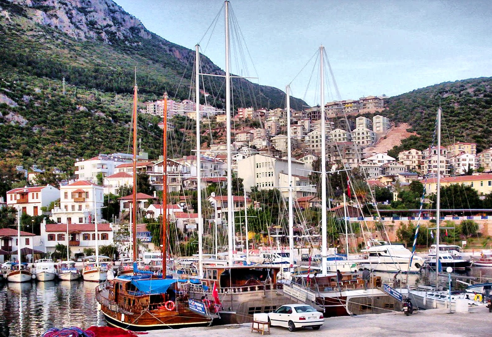 KAŞ